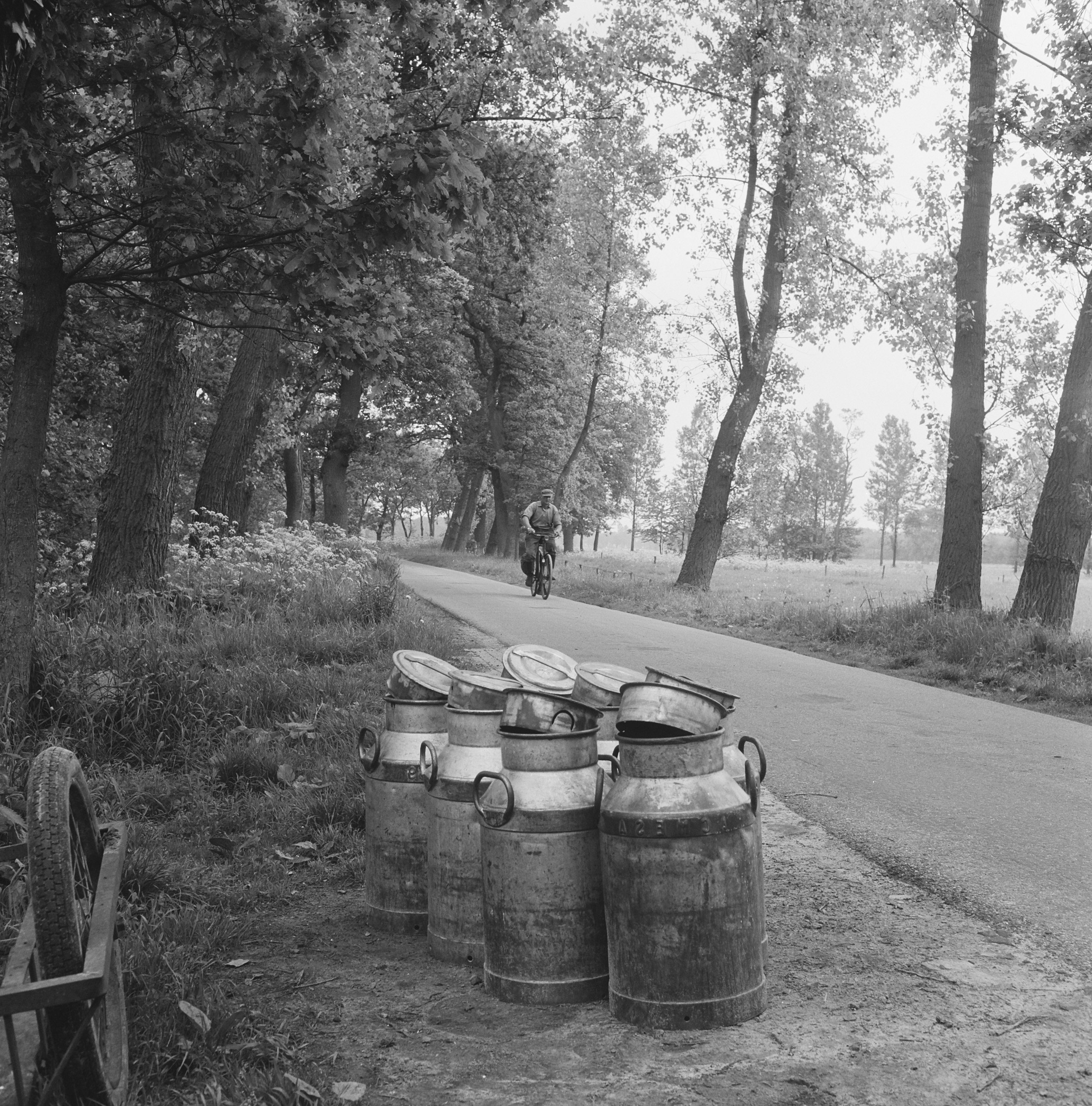 Collectie / Archief : Fotocollectie Nederlandse Heidemaatschappij Reportage / Serie : [ onbekend ] Beschrijving : traject assen zuidlaren Datum : juni 1967 Locatie : Oudemolen Trefwoorden : fietspaden, melkbussen Fotograaf : Fotograaf Onbekend / Heidemij Auteursrechthebbende : Nationaal Archief Materiaalsoort : Negatief (zwart/wit) Nummer archiefinventaris : bekijk toegang 2.24.06.02 Bestanddeelnummer : 168-0427